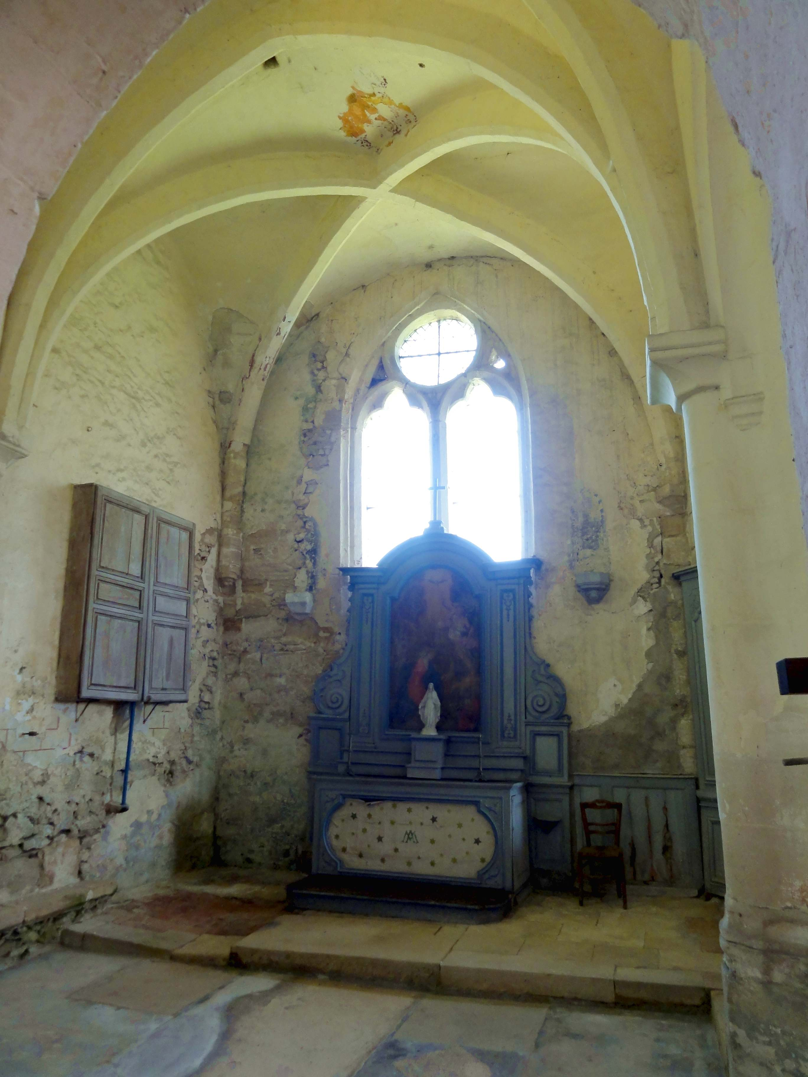 Intérieur de l'église (voir titre).